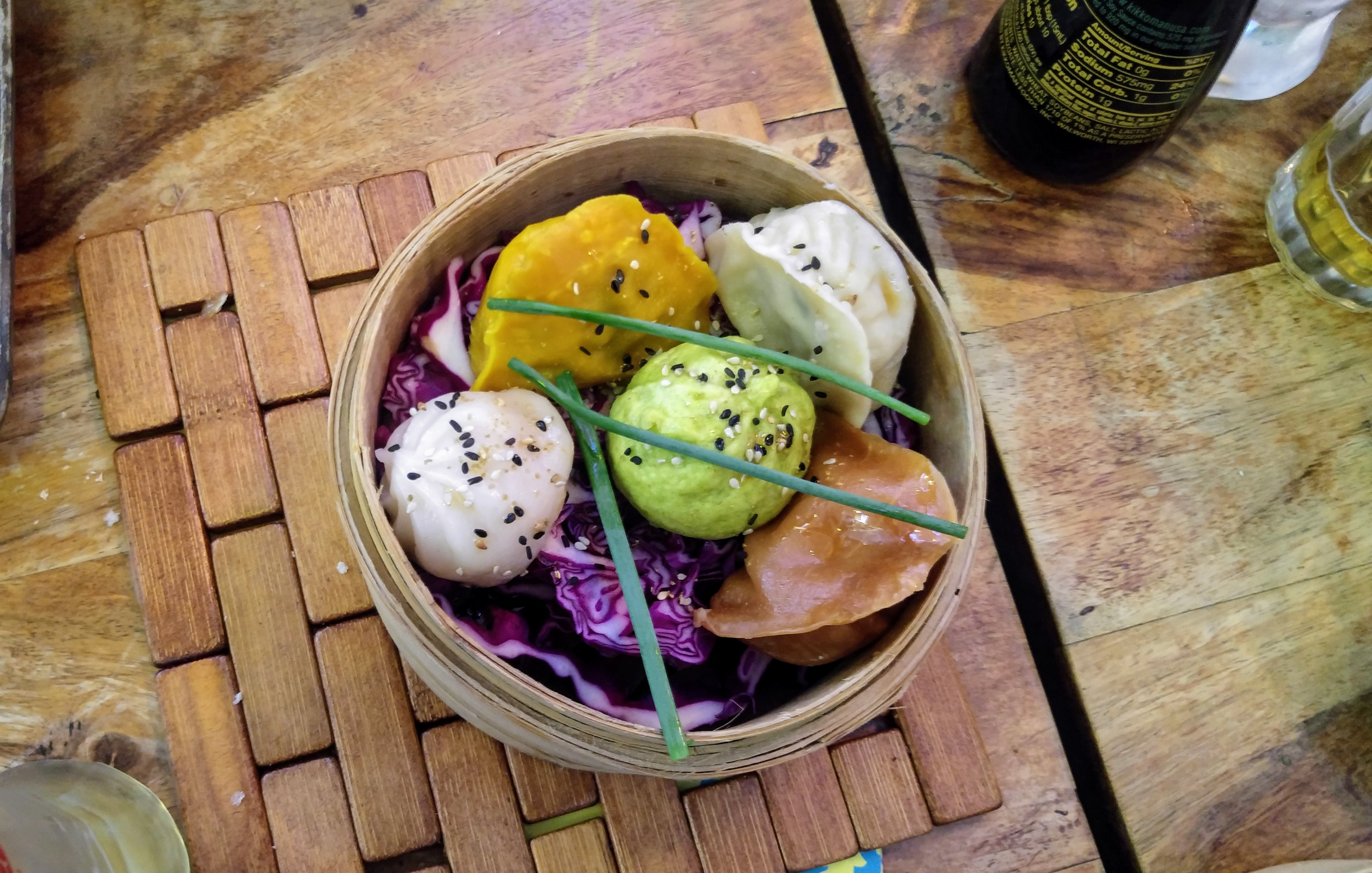 דים סאם במסעדת קאנו בפלורנטין